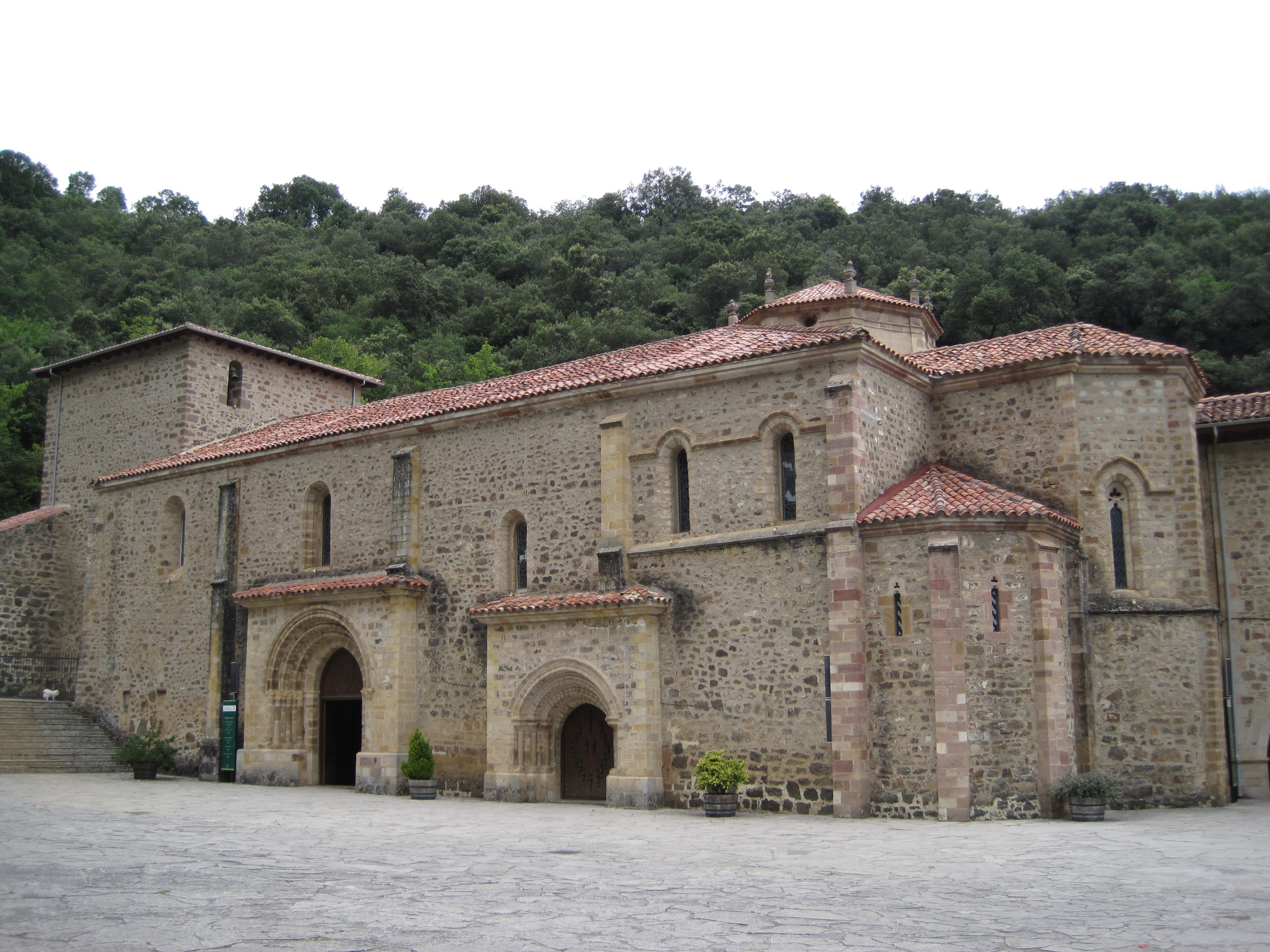 Vista exterior de la iglesia del monasterio de Santo Toribio de Liébana (Cantabria, España).